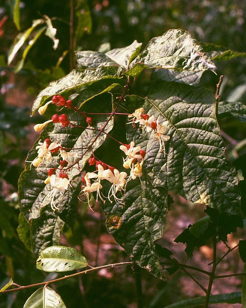 Clerodendrum schmidtii, Lamiaceae - Kambodscha/Cambodia, bei den Stromschnellen (rapids) des Flusses Tek Chhou N Kampot (Prov. Kampot)